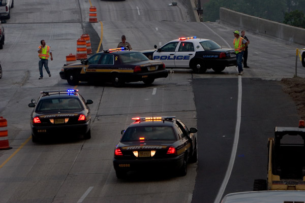 I-35W Mississippi River bridge collapse, Minneapolis, Minnesota